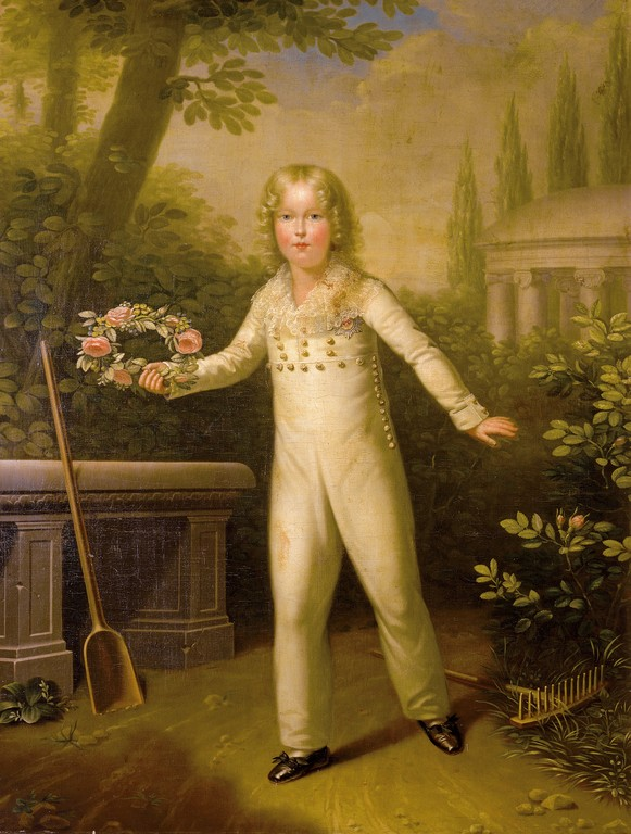 Der Herzog von Reichstadt als kleiner Gärtner